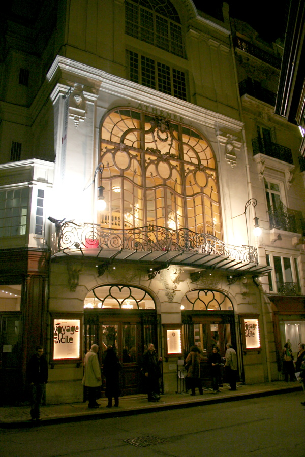 Théâtre de l'Athénée - Louis Jouvet (Paris) by night